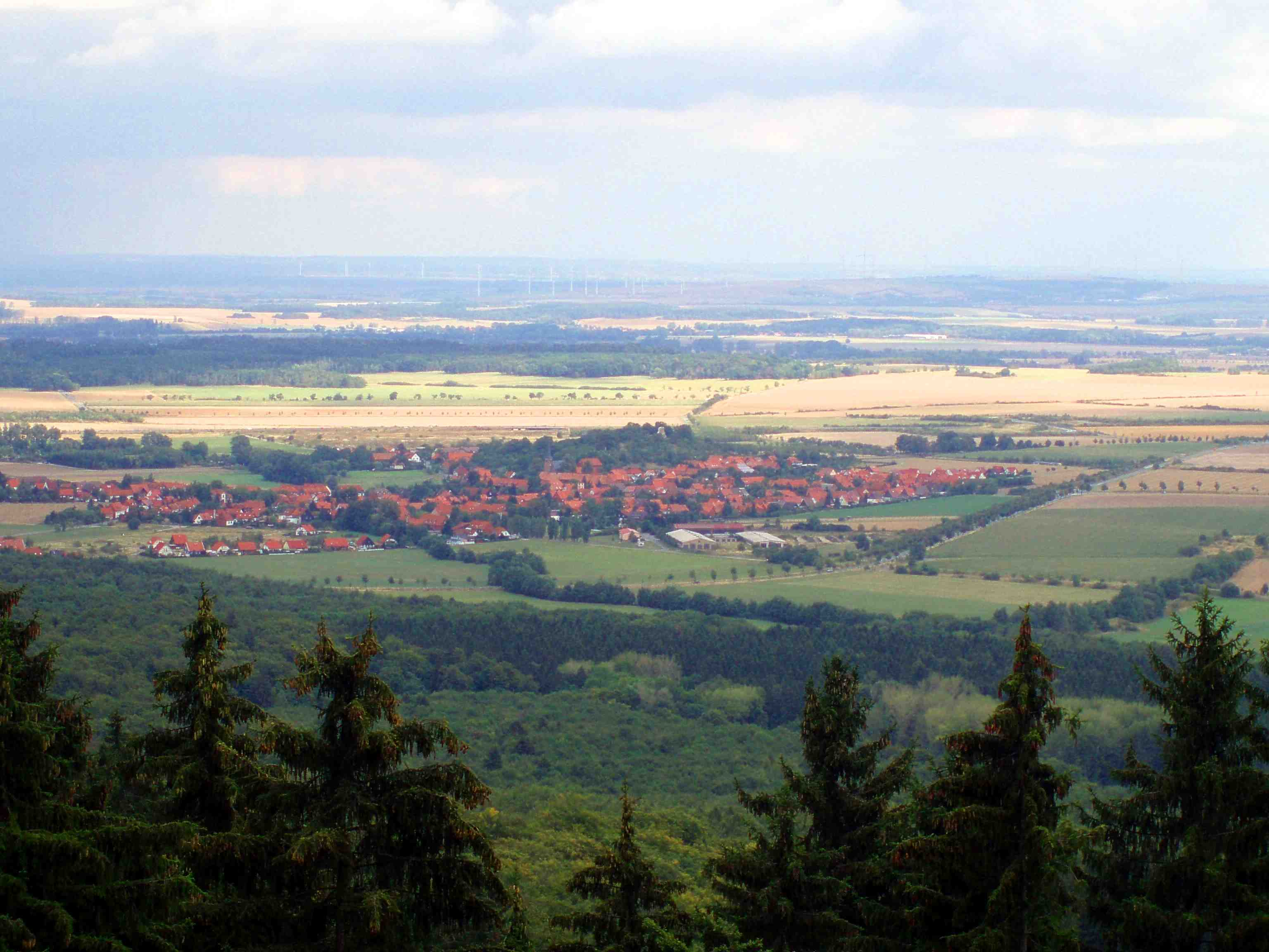 Blick auf Stapelburg, Sachsen-Anhalt, Deutschland